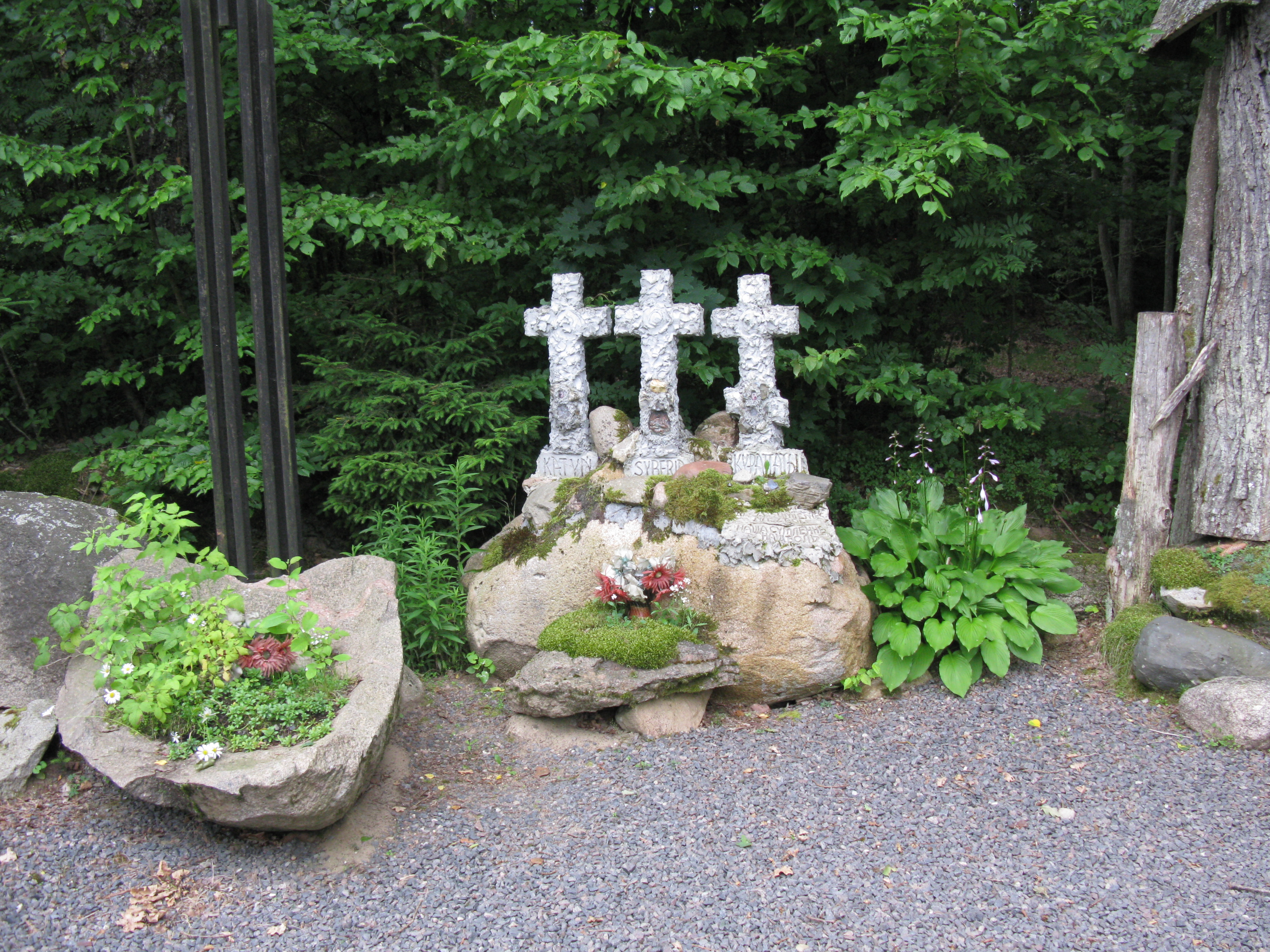 Miejsce pamięci we wsi Topiło poświęcone leśnikom pomordowanych podczas II wojny światowej.